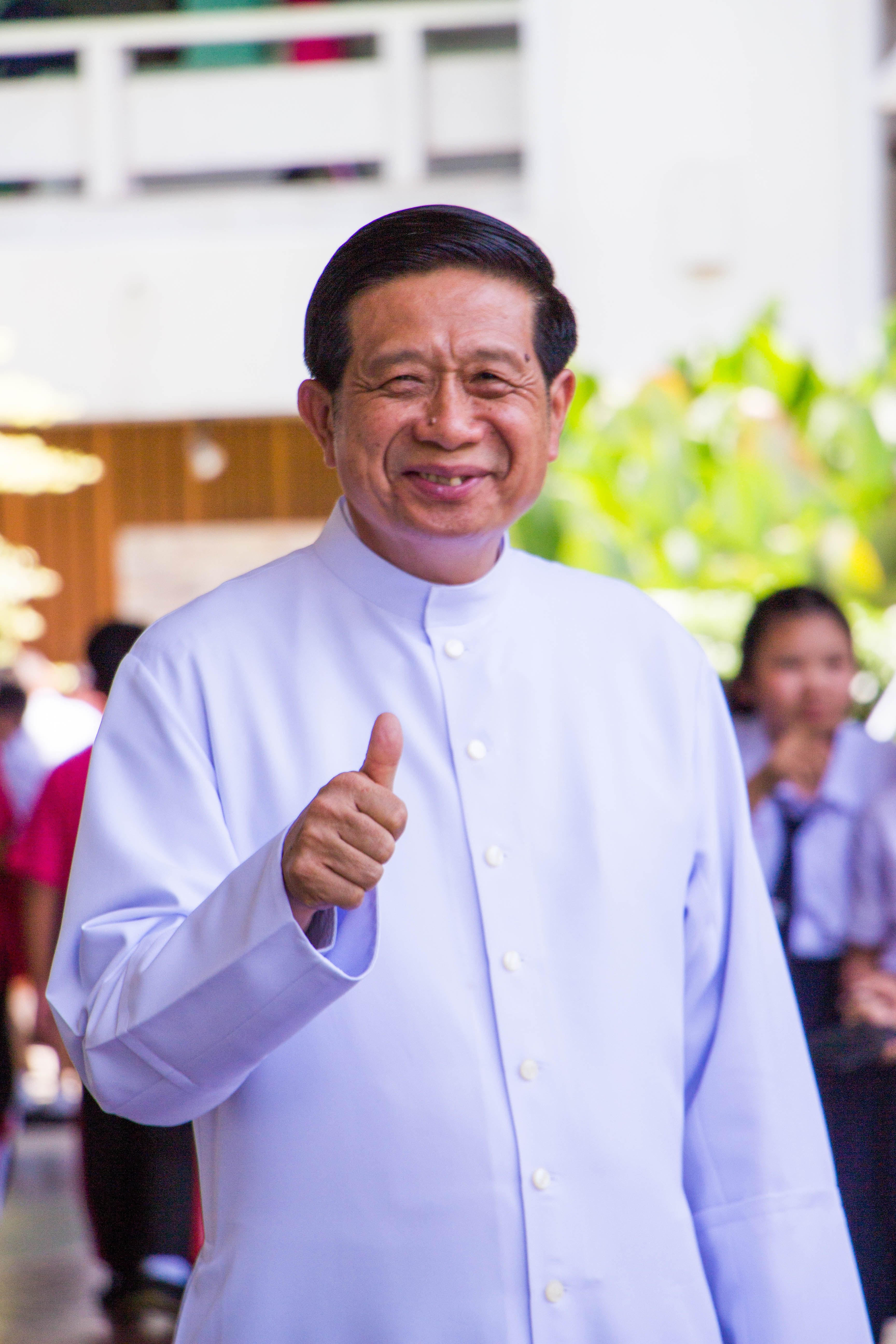 บาทหลวง ดร. จำเนียร จิตเสรีวงศ์ อธิการ ผุ้อำนวยการโรงเรียนดรุณาราชบุรี